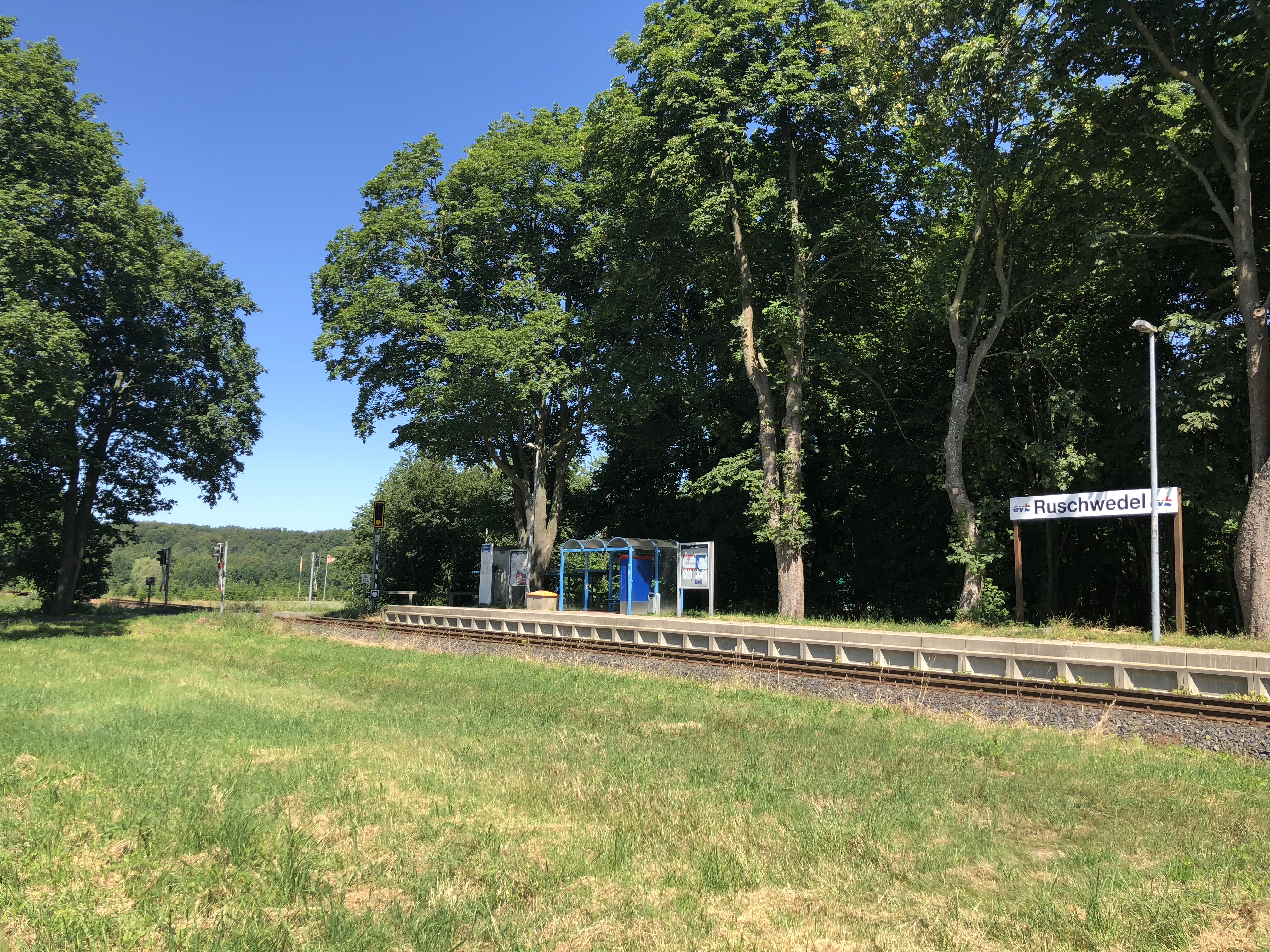 Bahnhoff in Ruschwedel